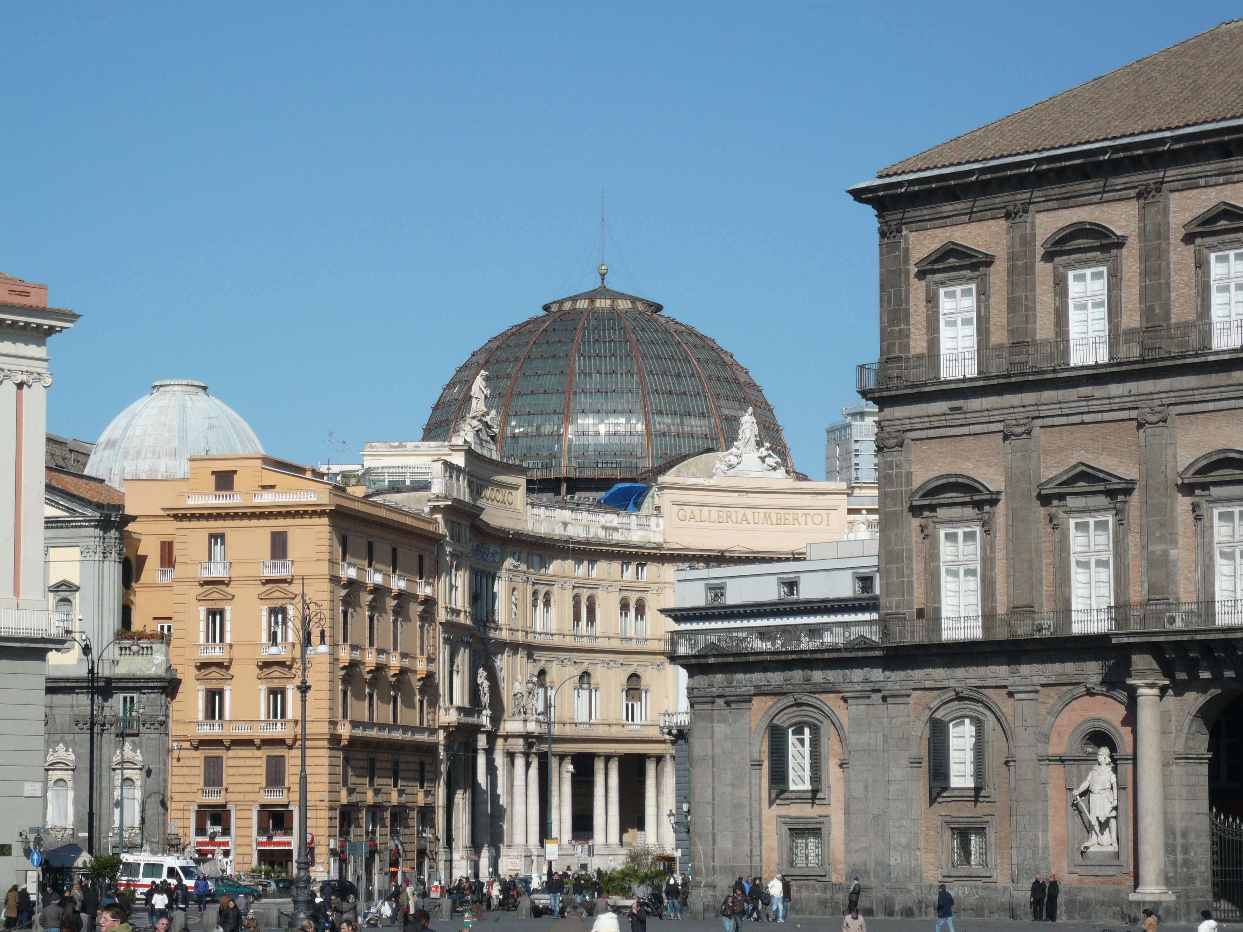 la Galleria vista da piazza del Plebiscito. In primo piano sulla destra, uno scorcio della facciata principale di Palazzo Reale addobbata con le statue dei sovrani che hanno regnato a Napoli. Nella foto si vede quella di Ruggero il Normanno. Sulla sinistra, accanto alla grande cupola della Galleria, c'è quella della Chiesa di San Ferdinando di cui si scorge anche parte della facciata. Autore foto: Roberto De Martino